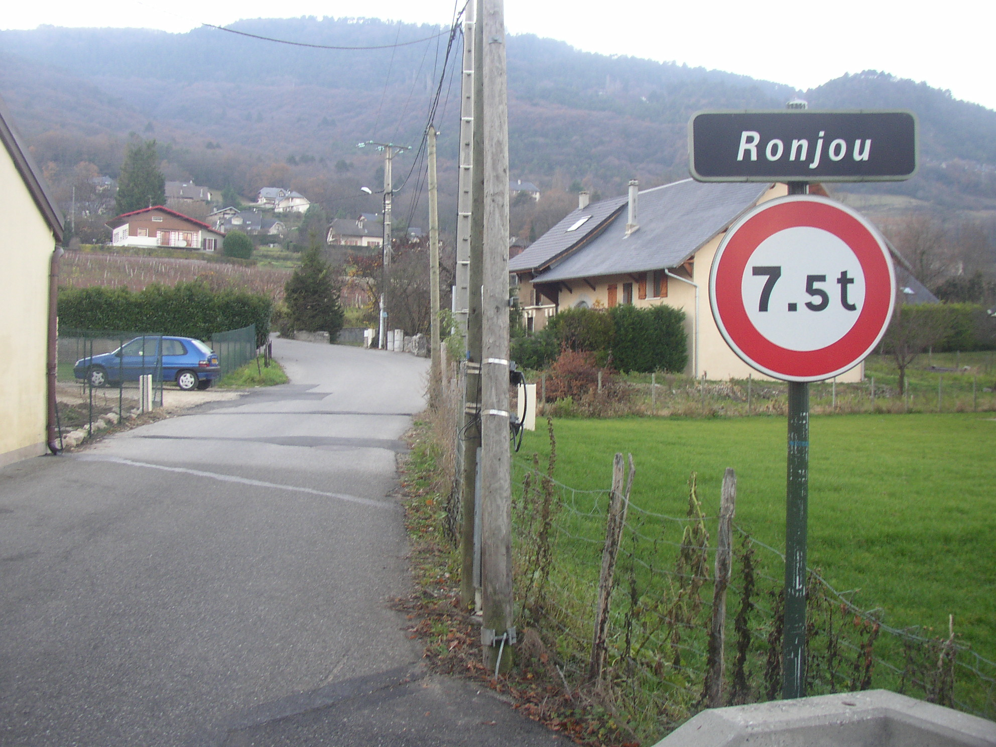 Ronjou, un lieu-dit de la commune de Saint-Baldoph près de Chambéry en Savoie, en décembre 2006. Photo personnelle.